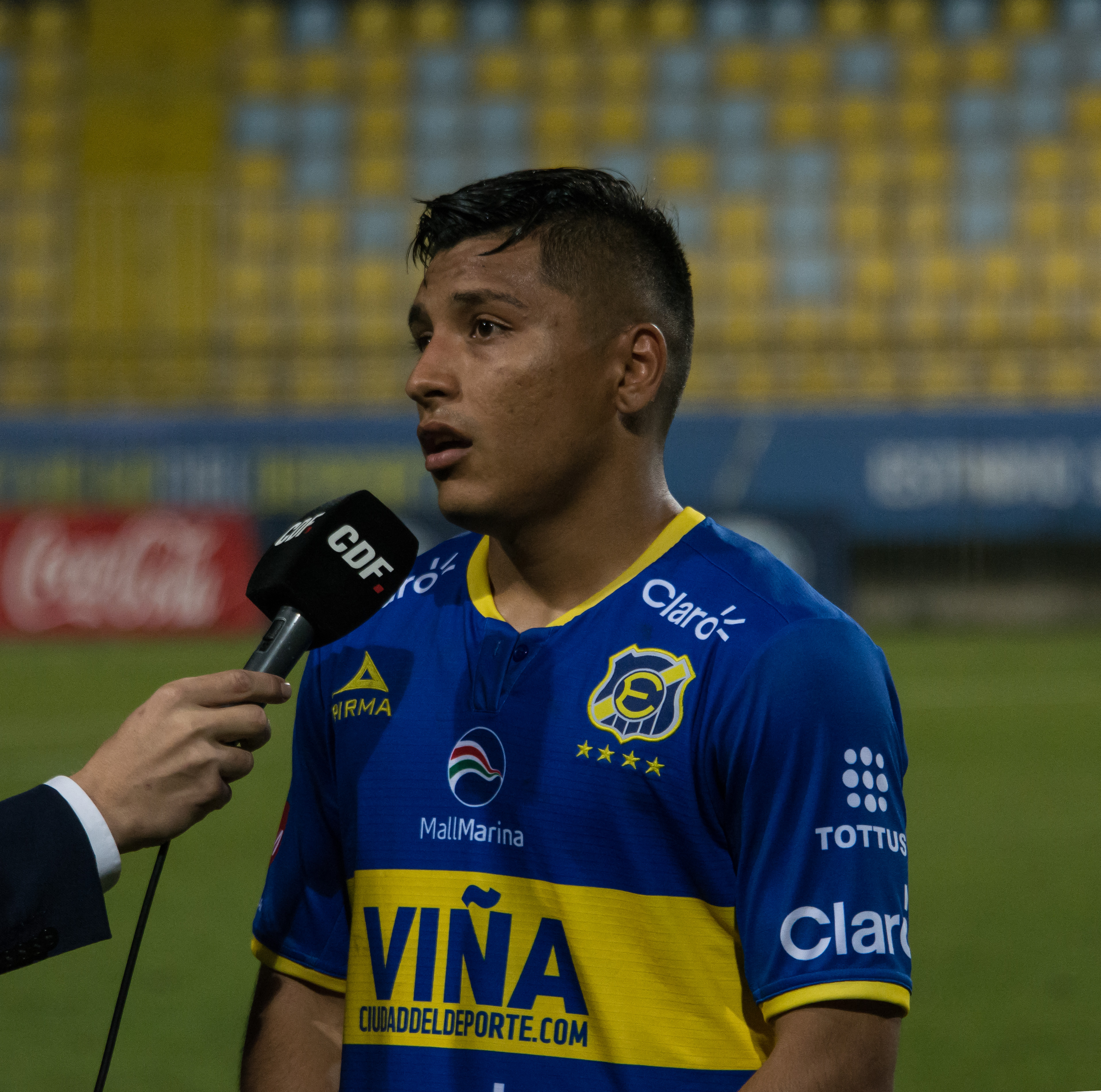 Everton v Unión Española, Estadio Sausalito, Viña del Mar, Chile.